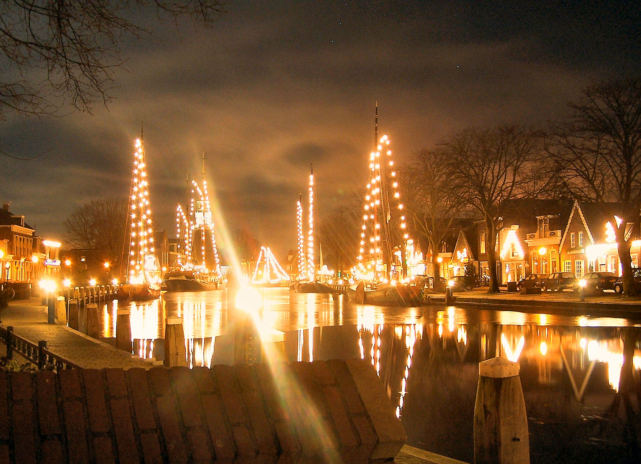 lemmer Dok vlak na Kerst